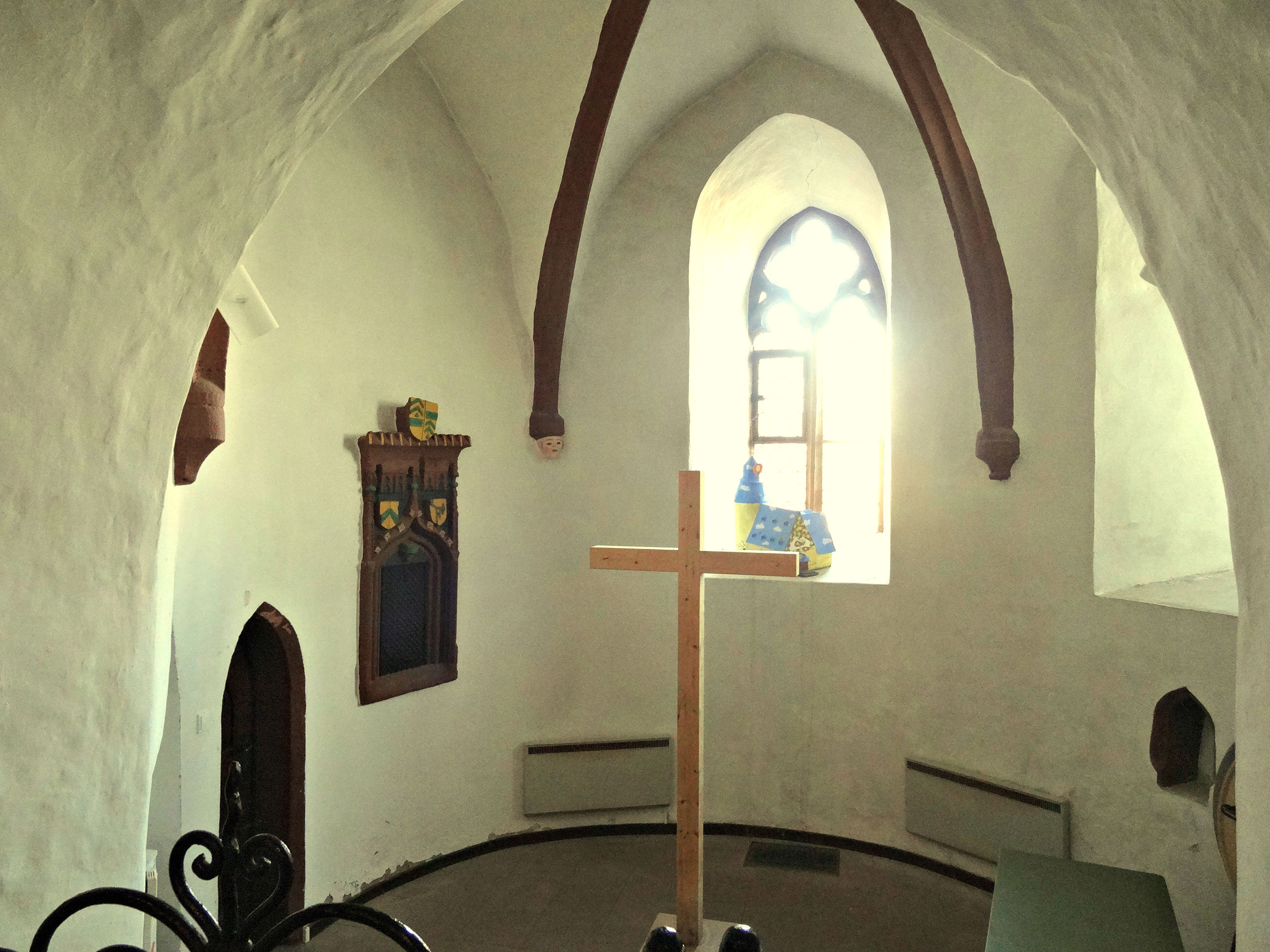 Evangelische Pfarrkirche (Griedel)